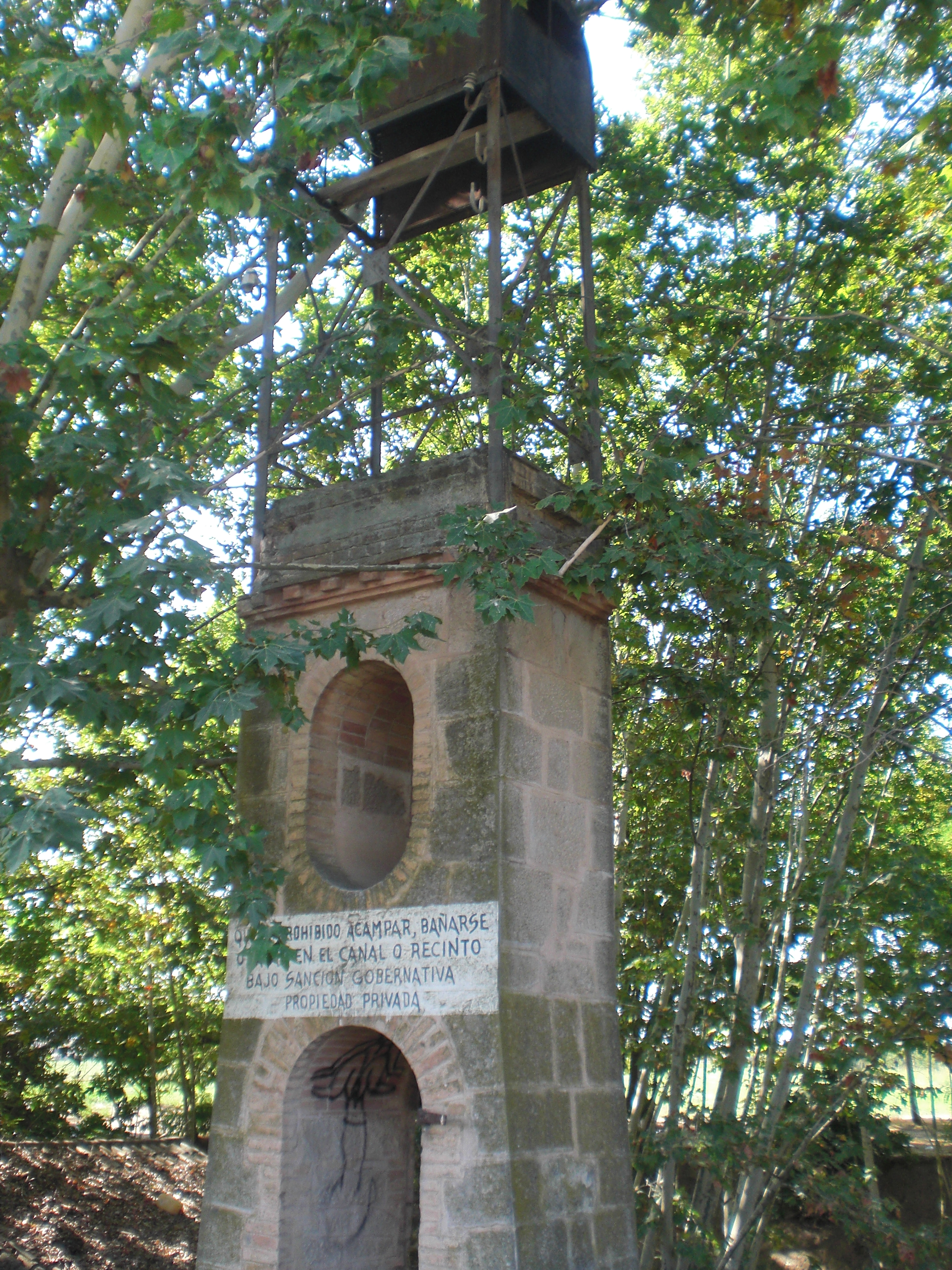 Pilastra dels Fondets (Golmés)